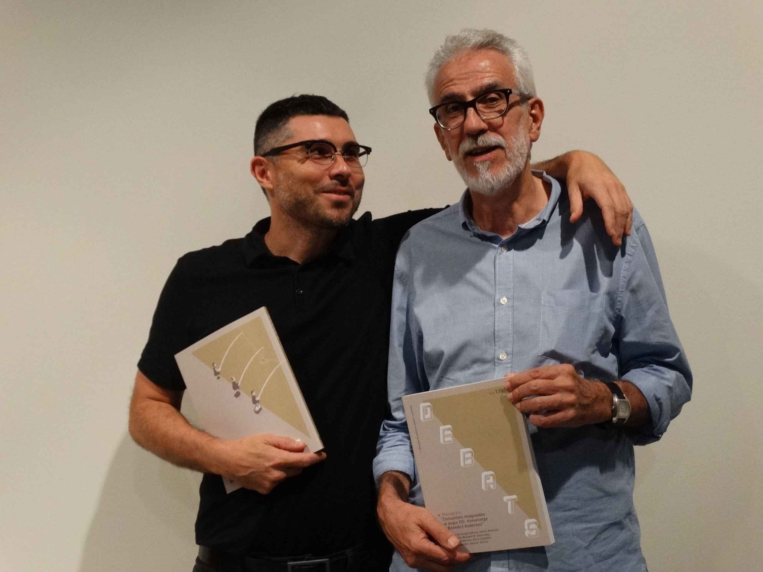 Taula redona de la presentació de la nova etapa de la Revista Debats